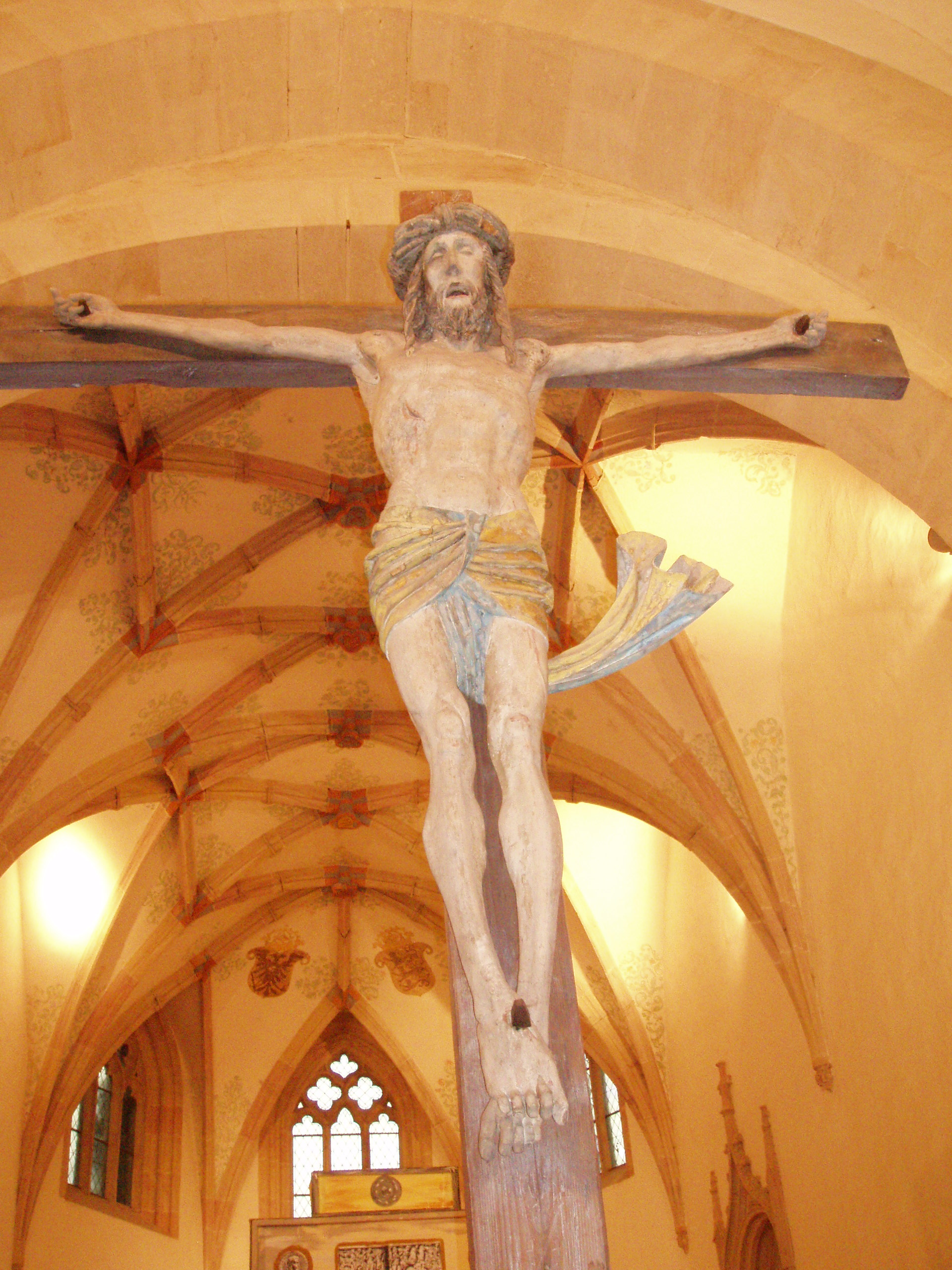 Kloster Lorch